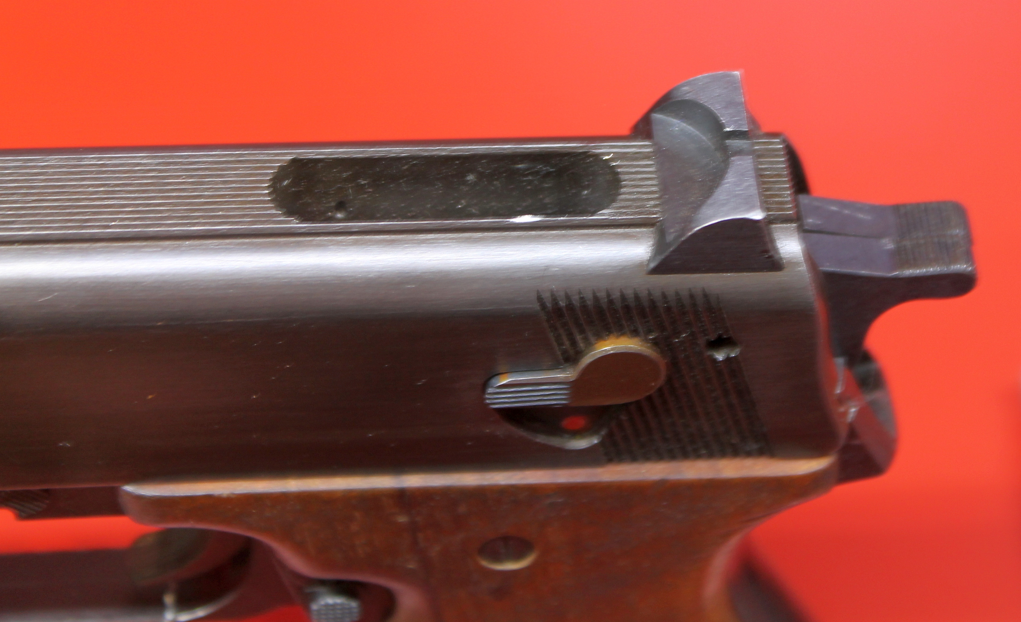 Maschinenpistole IX. Parteitag im Waffenmuseum Suhl, Detail.